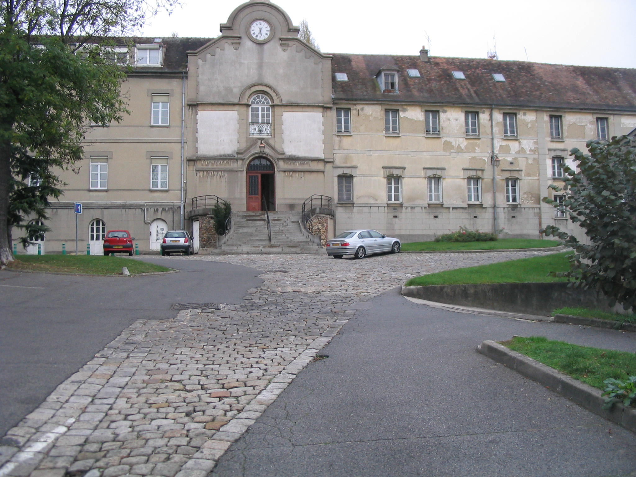 L'ancien couvent des Recollets à Melun(France).